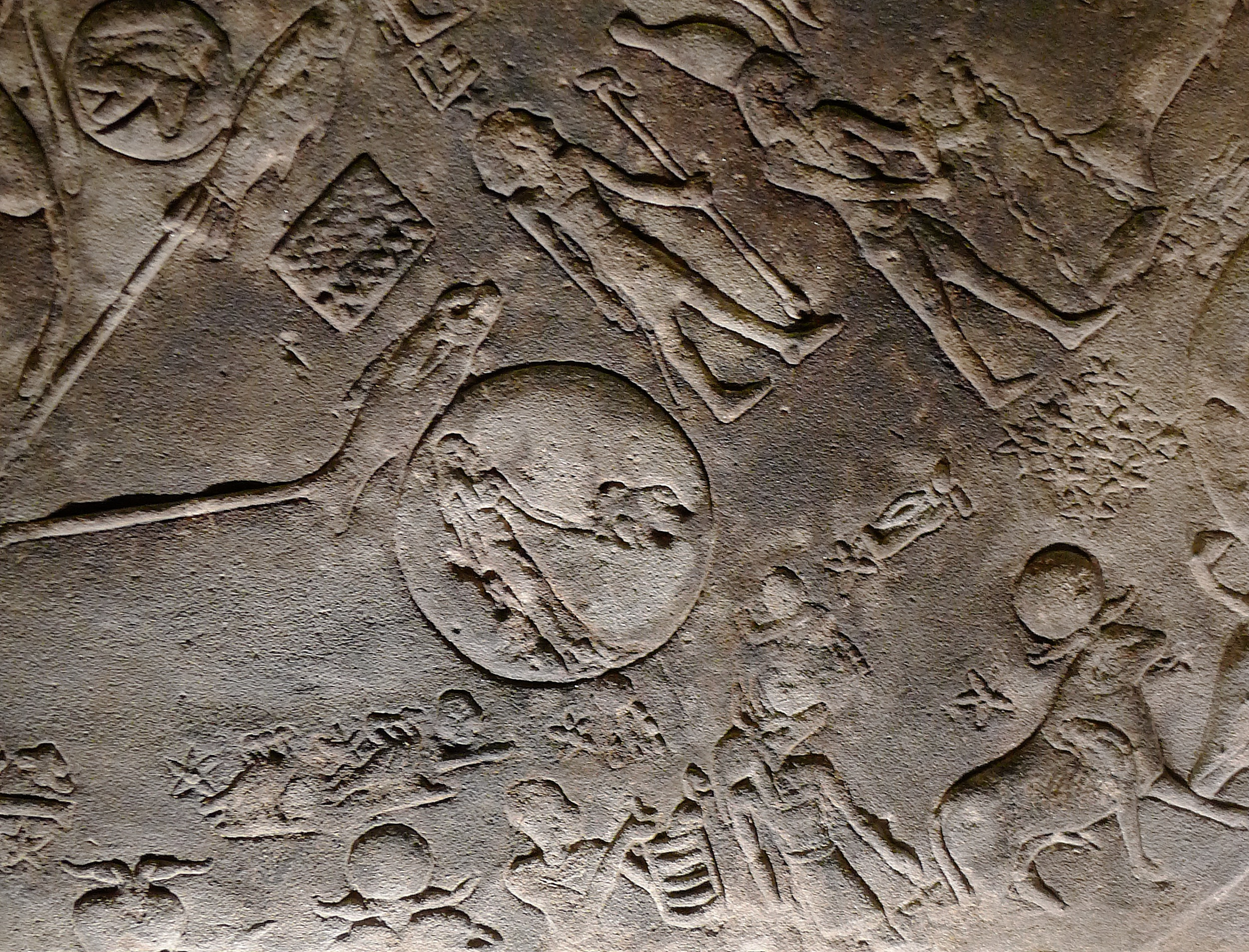 Le Zodiaque de Dendera (éclipse solaire du 7 mars 51 av. J.-C.)